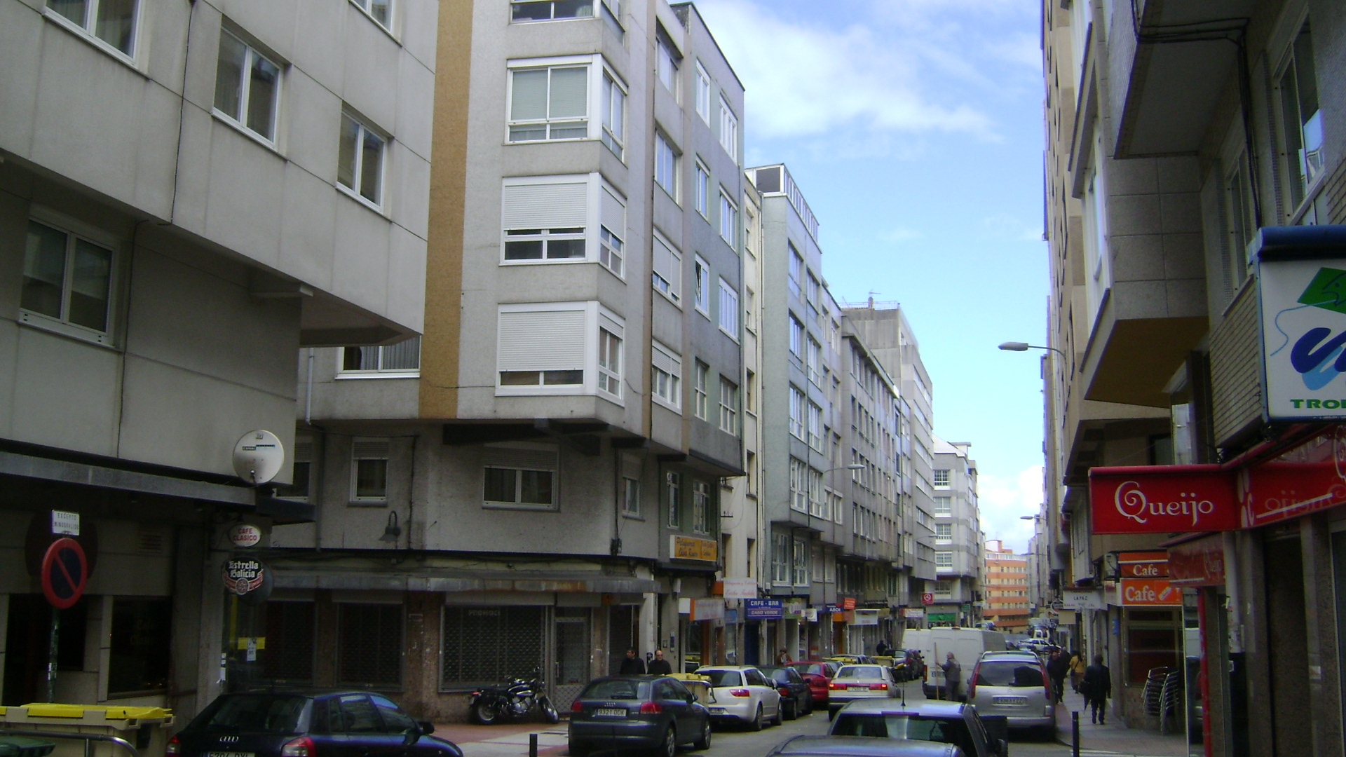 Calle en el barrio Agra del Orzán, La Coruña (España)